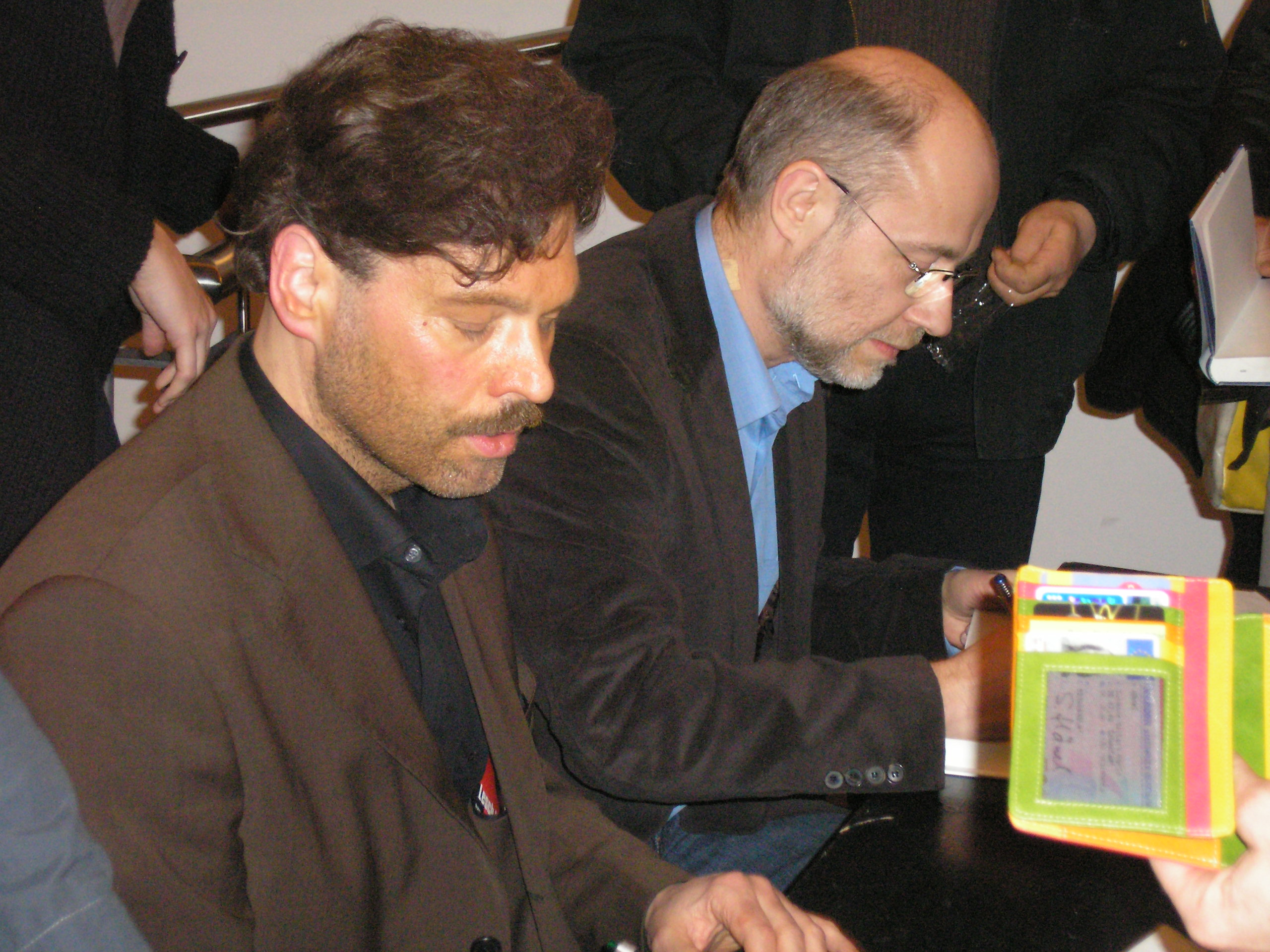 Die Autoren Harald Zaun (links vorne) und Harald Lesch (rechts hinten) während einer Signierstunde im Münchner Volkstheater 2008.